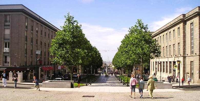 Haut de la rue de Siam avant le tramway en 2005 (pc29 - Licence Creative Commons by-nc-sa